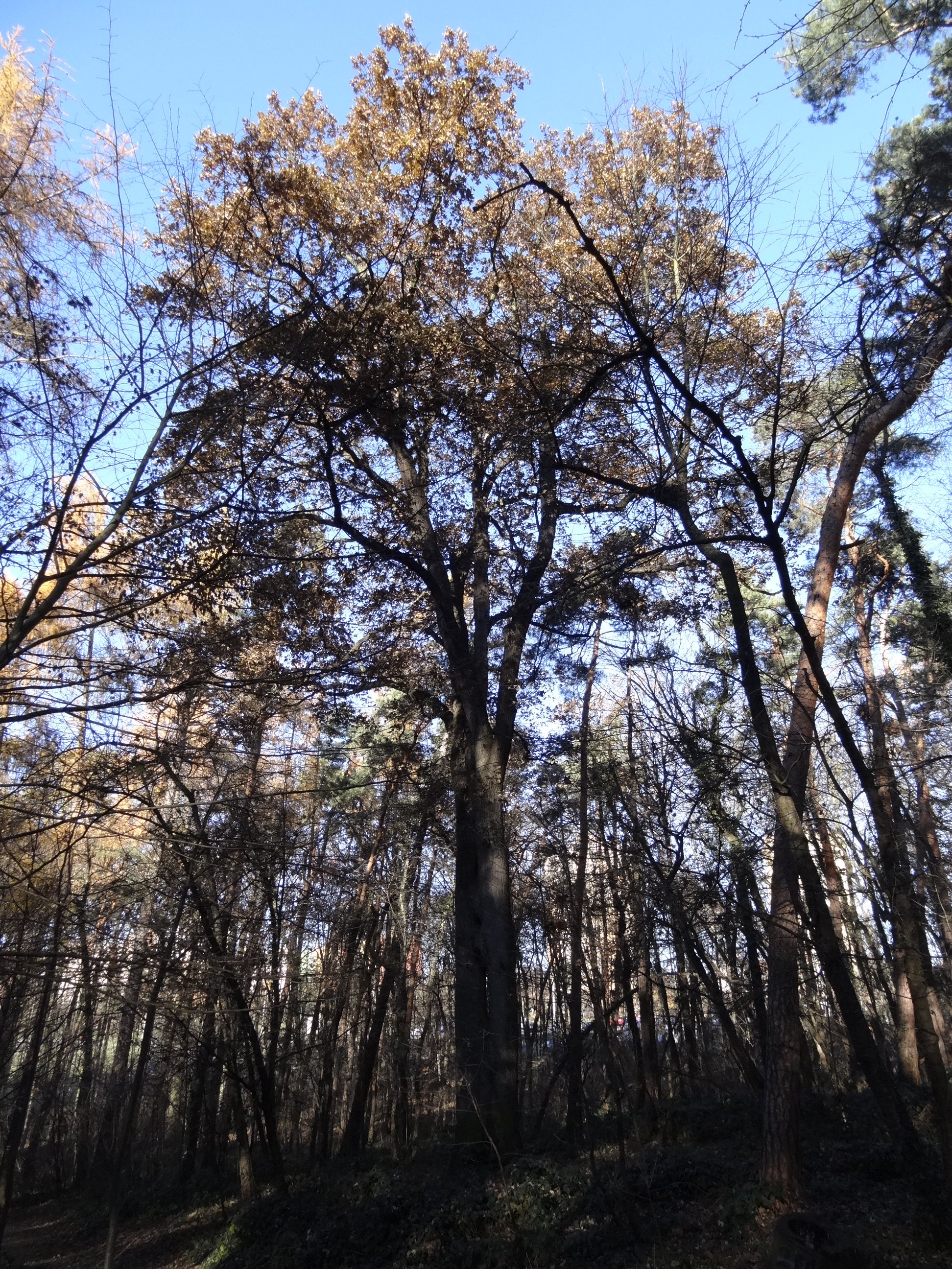 Praha-Kamýk - památný dub letní v lesním porostu